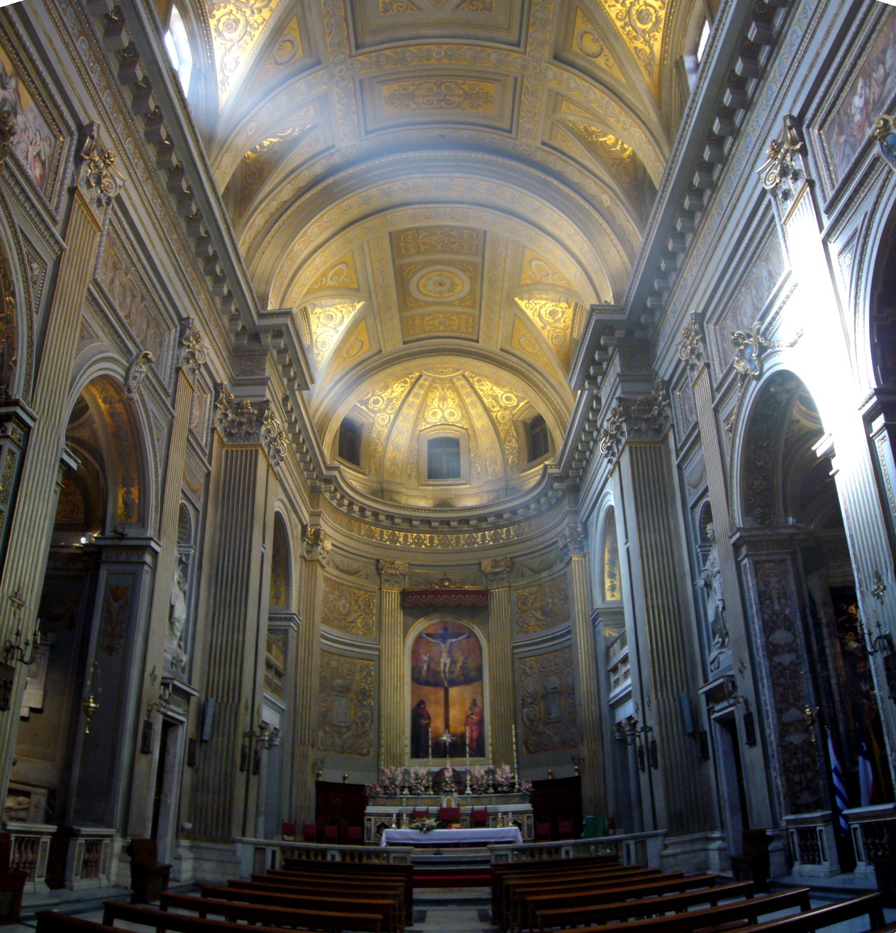 Roma, Santa Maria in Monserrato: interno